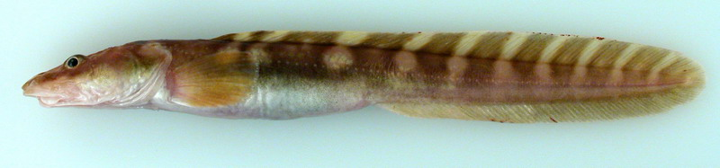 Polar Eelpout Lycodes turneri Bean, 1879